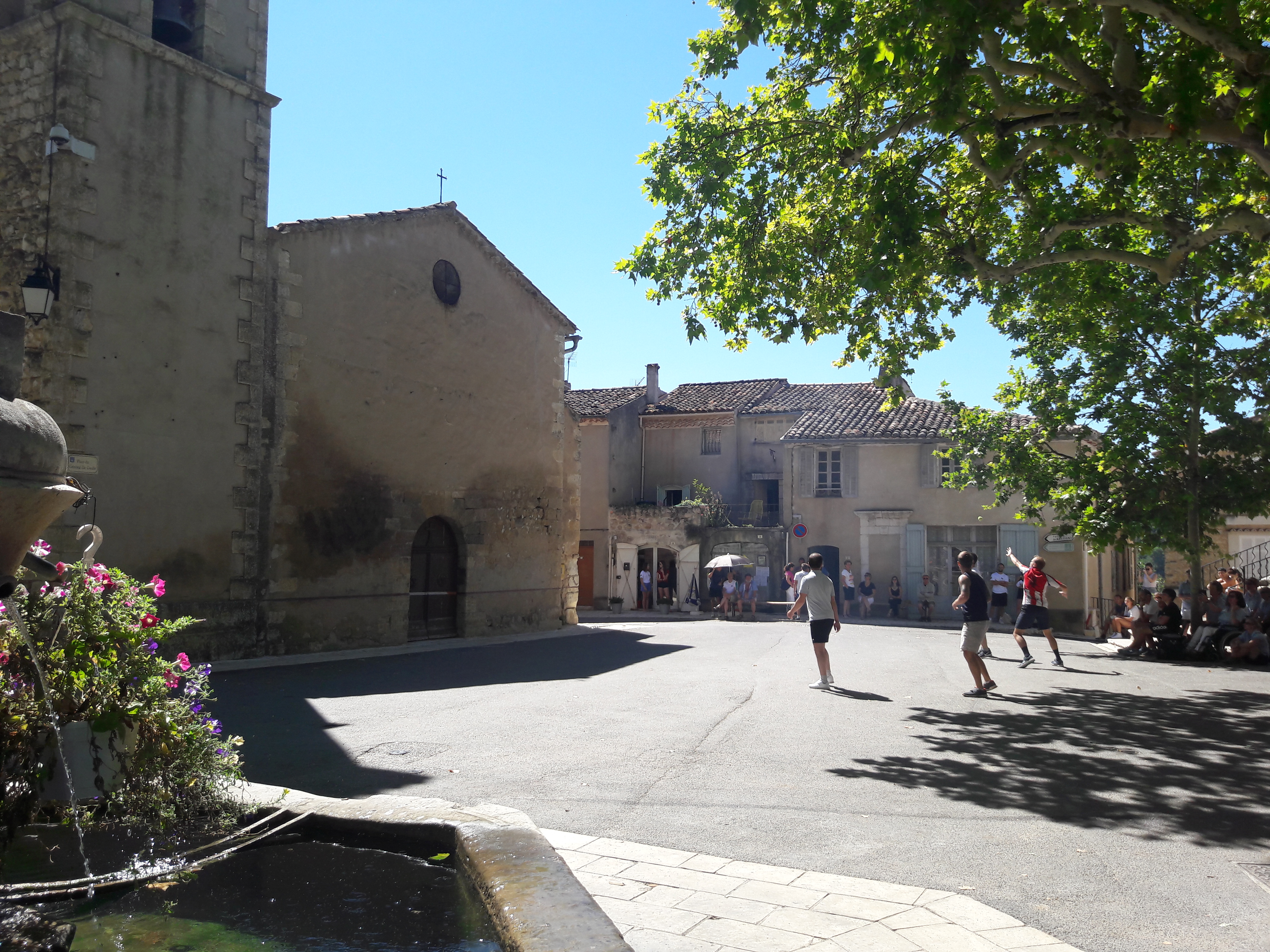 Match de paume artignoscaise pendant les épreuves de la Coupe du monde artignoscaise organisé par l'AIPA (Association internationale de paume artignoscaise)